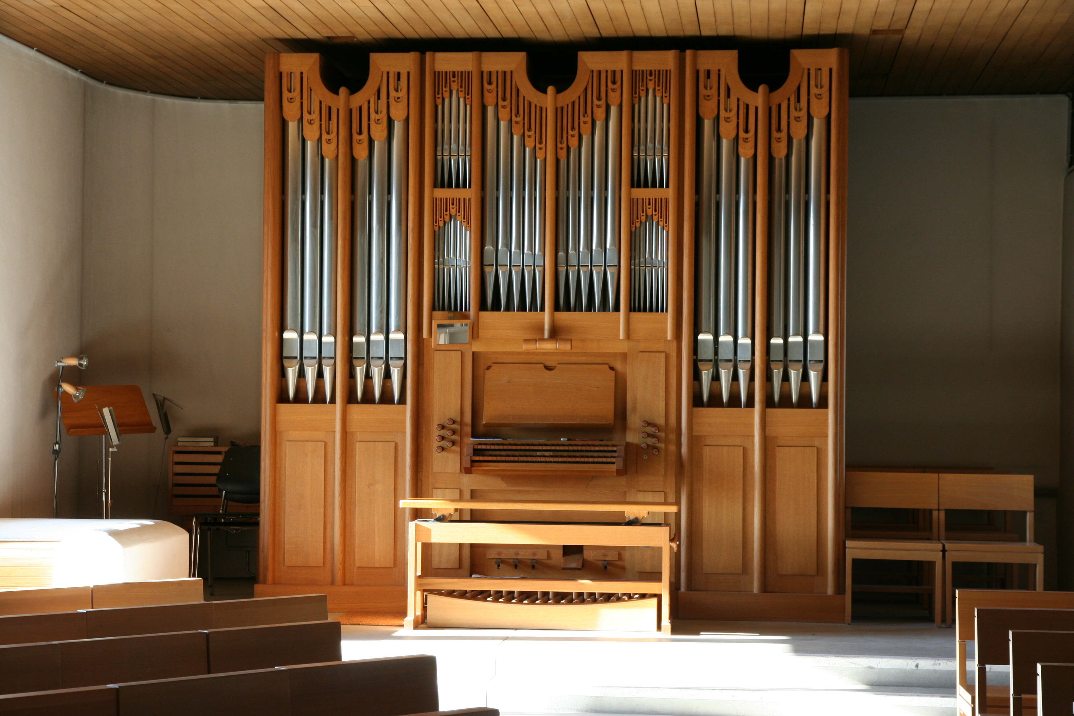 Römisch-katholische Pfarrkirche St. Burkard Mettmenstetten ZH